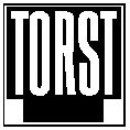 logo nakladatelství TORST